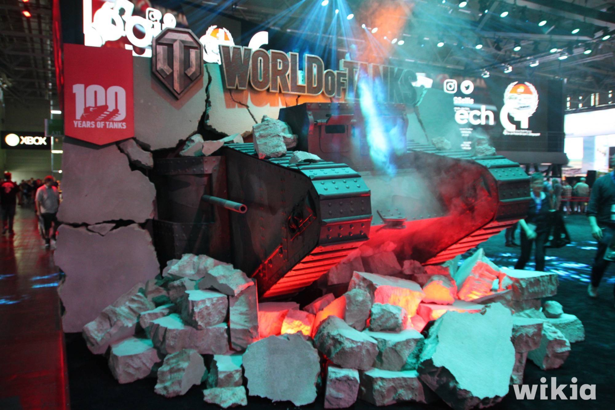 Gamescom 2016 impressions